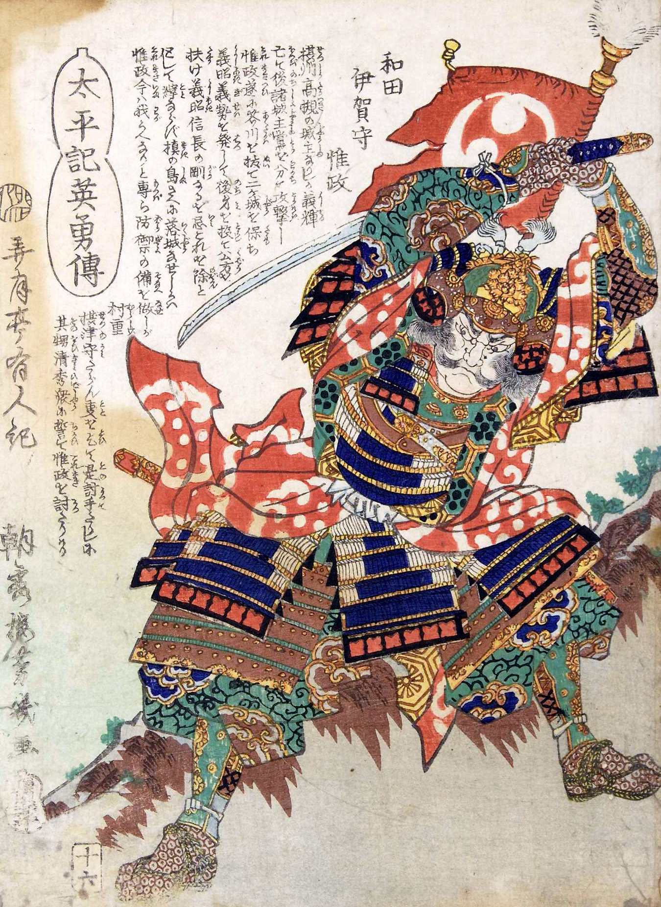 「太平記英勇伝十六：和田伊賀守惟政」